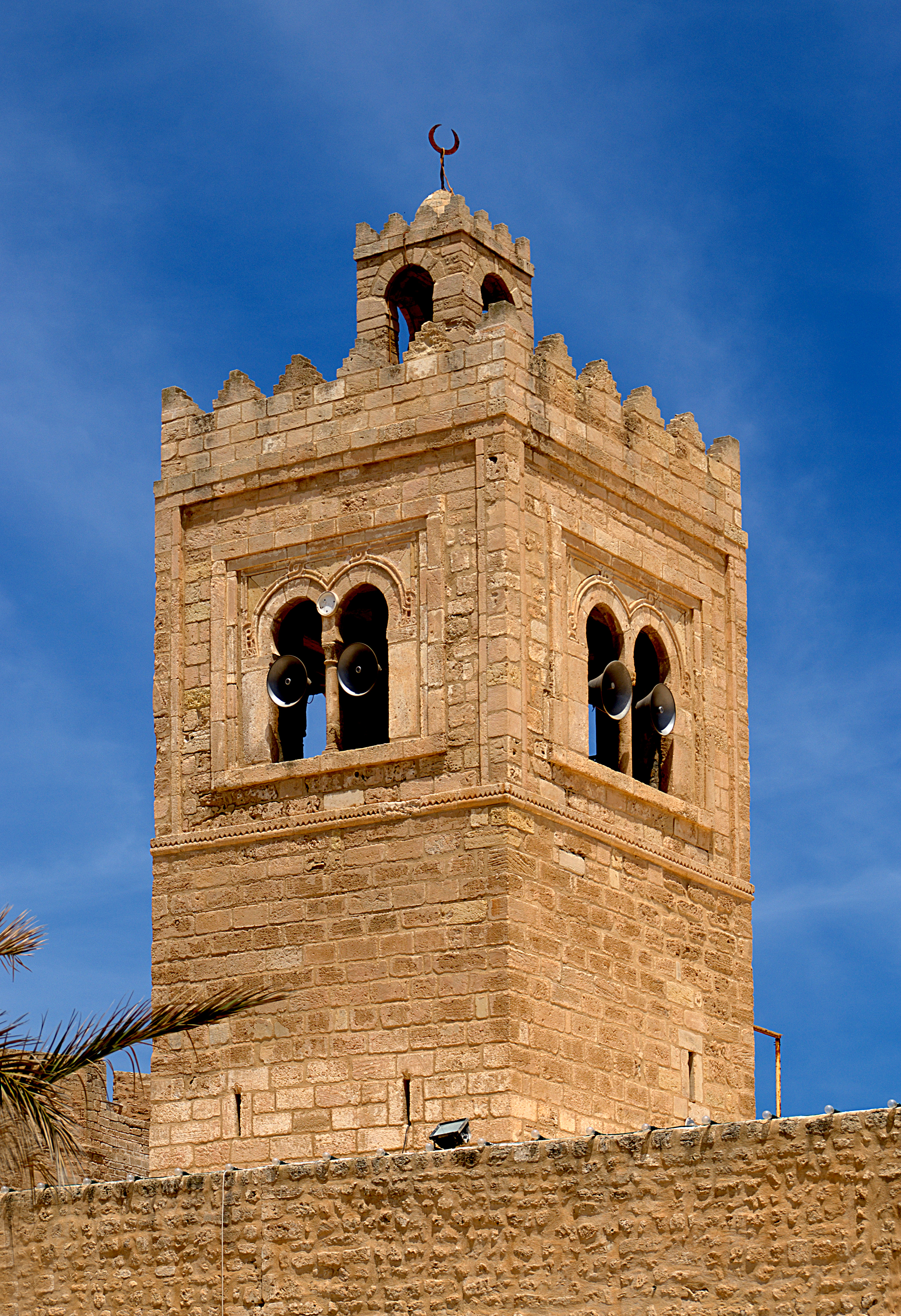 Mesjed de la Saïda (mère de l'Émir Badis), Monastir